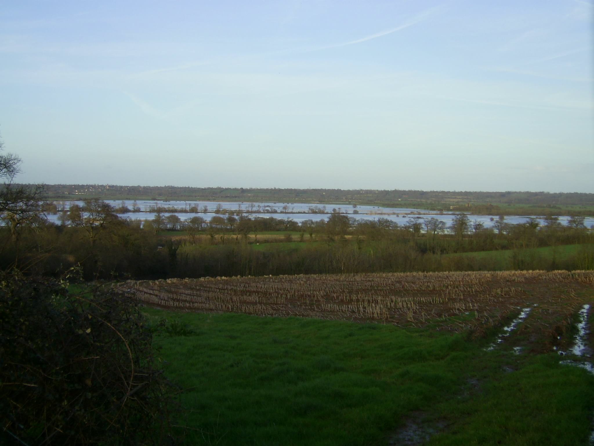 Marais vue des environs de Pont Hebert